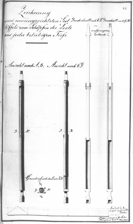 Solebohrgestaenge, Konstruktionszeichnung 18. Jhdt.